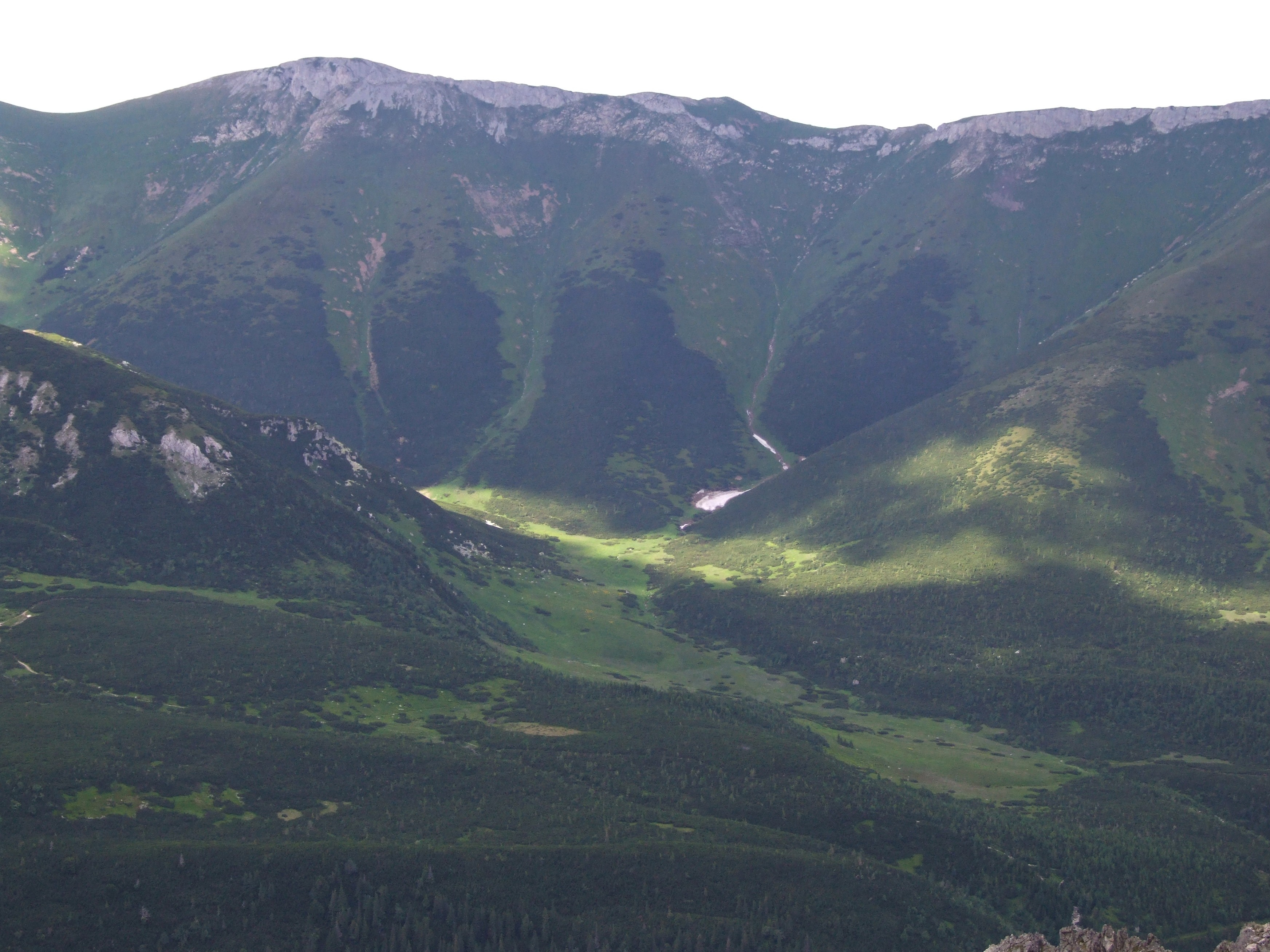 Bielskie Jatki